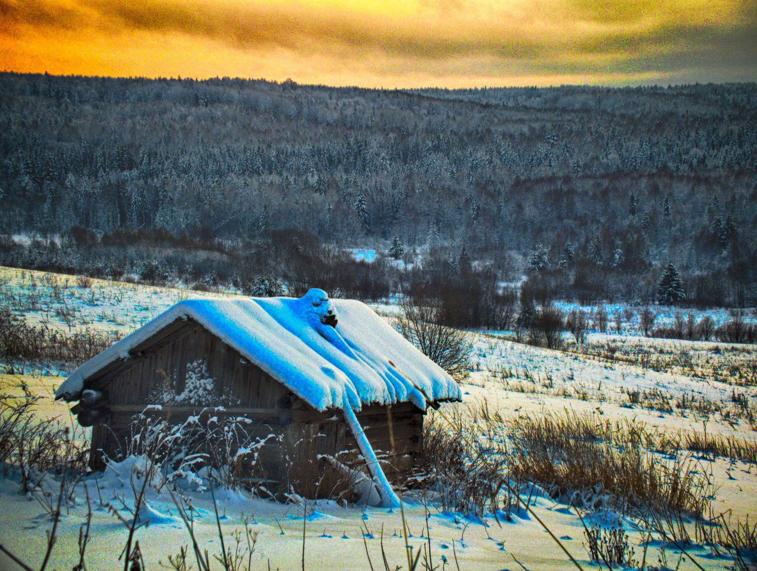 Savinskaya, Arkhangelskaya oblast', Russia, 165109